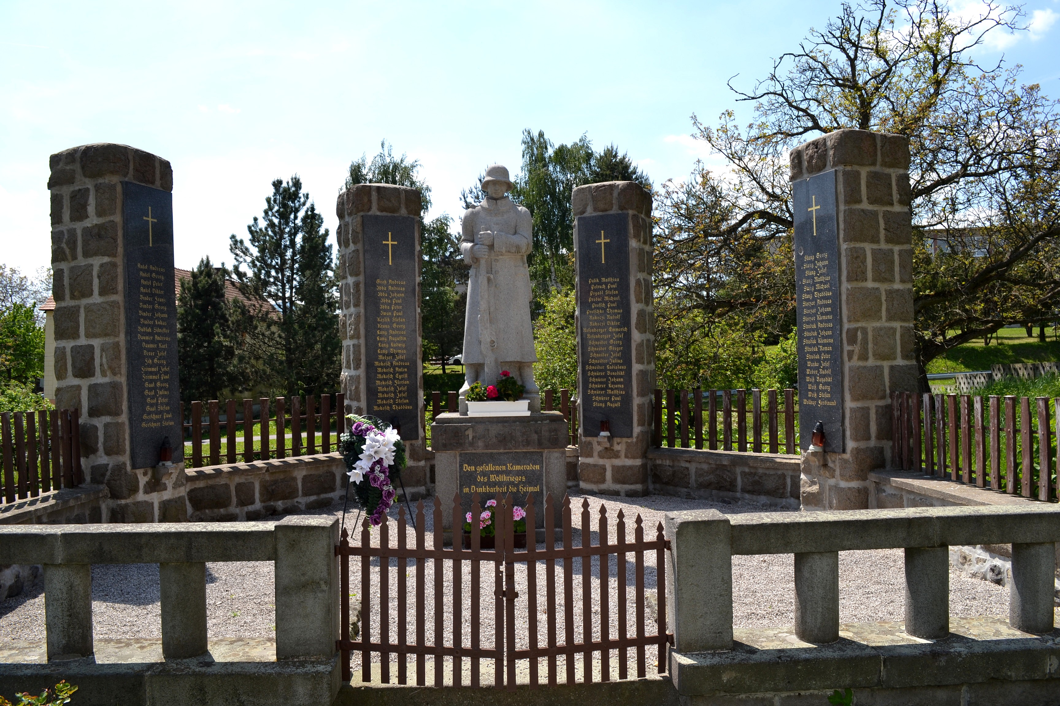 Janova Lehota (okr. Žiar nad Hronom), pamätník obetiam I. svetovej vojny